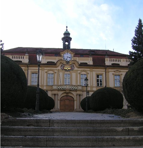 Libeňský zámeček